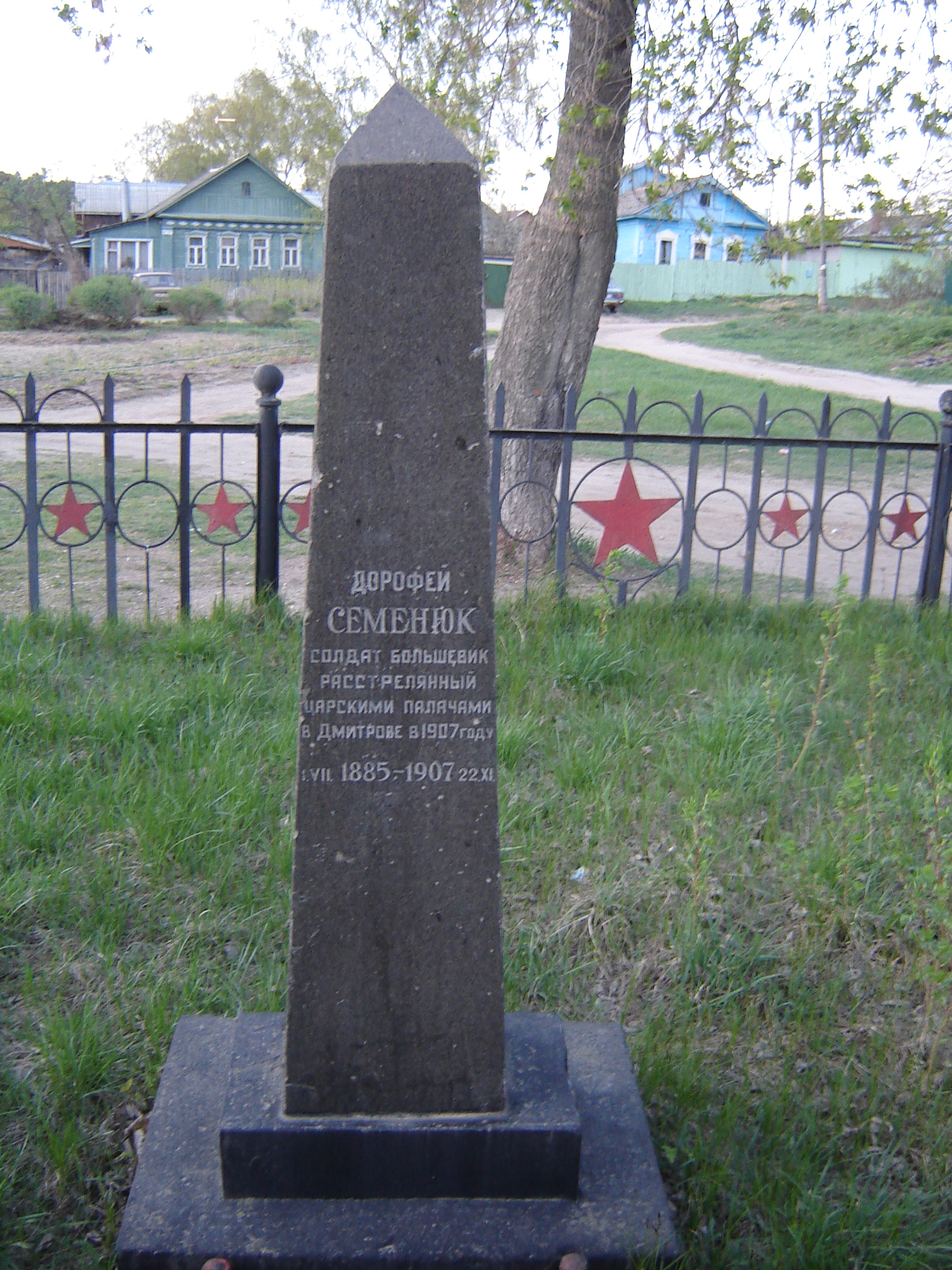 Обелиск-захоронение солдата-революционера Семенюка Дорофея Исидоровича, расстрелянному по приговору суда за убийство подпрапорщика Золотарёва в 1907 году в городе Дмитрове Московской области. Установлен в 1922 году.